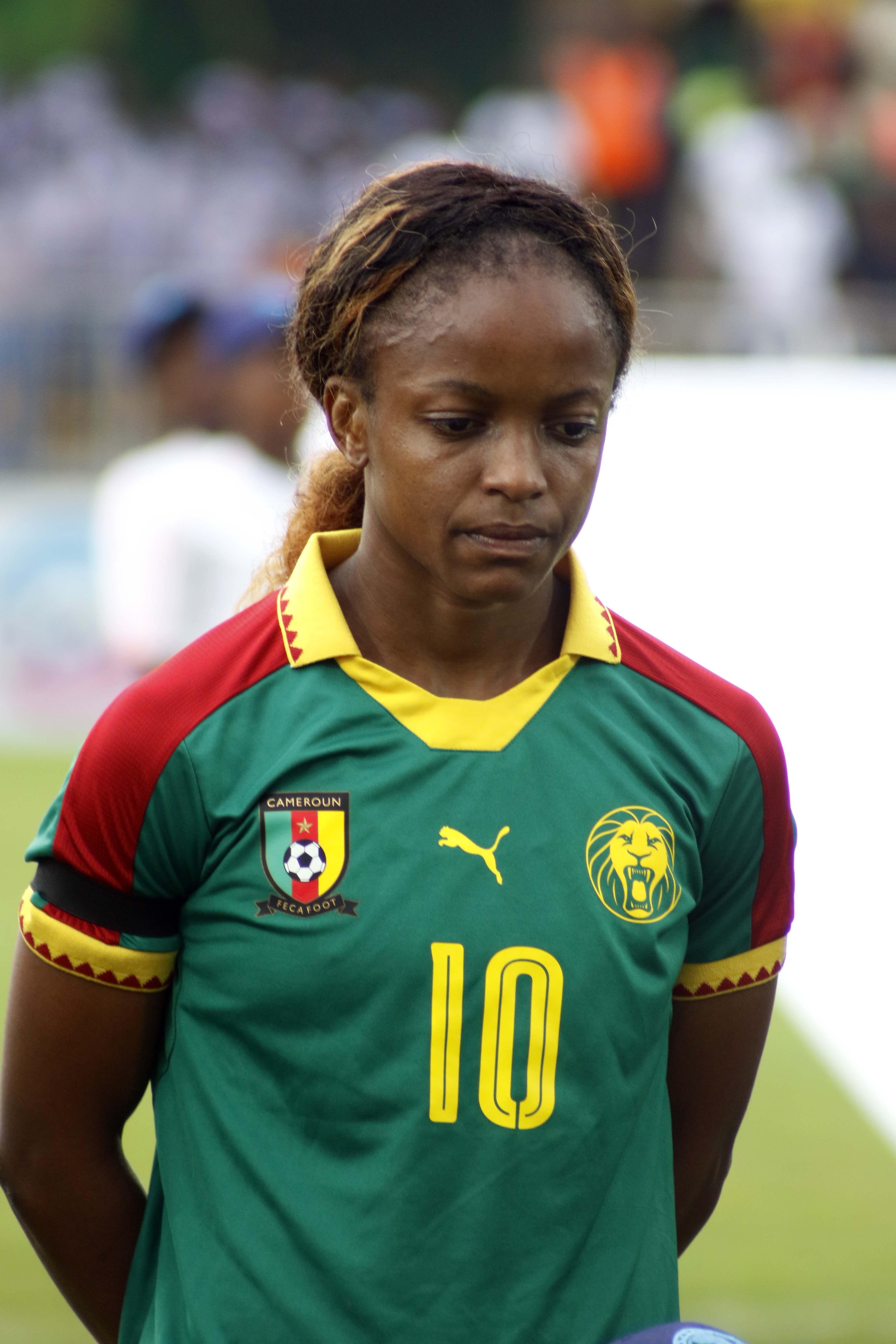 La milieu de terrain de l'équipe nationale du Cameroun évoluant au FC Brest en France